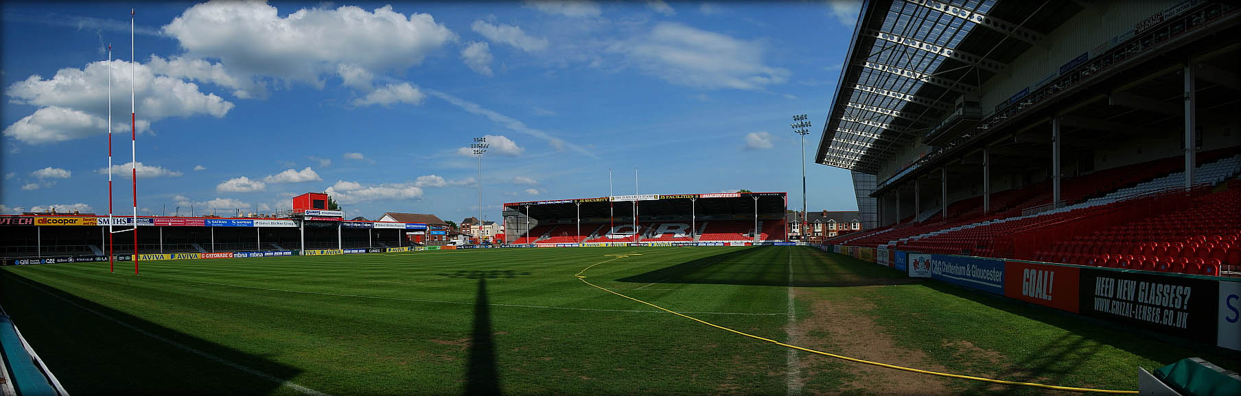 Gloucester, Kingsholm.